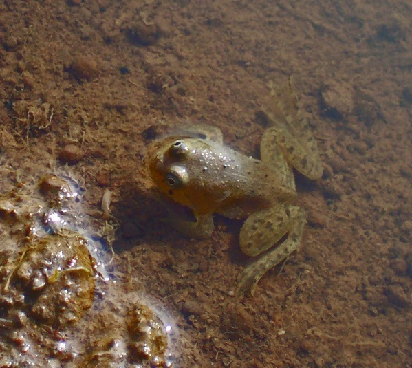 Occidozyga lima, juvenile, Darmaga, Bogor, West Java, Indonesia